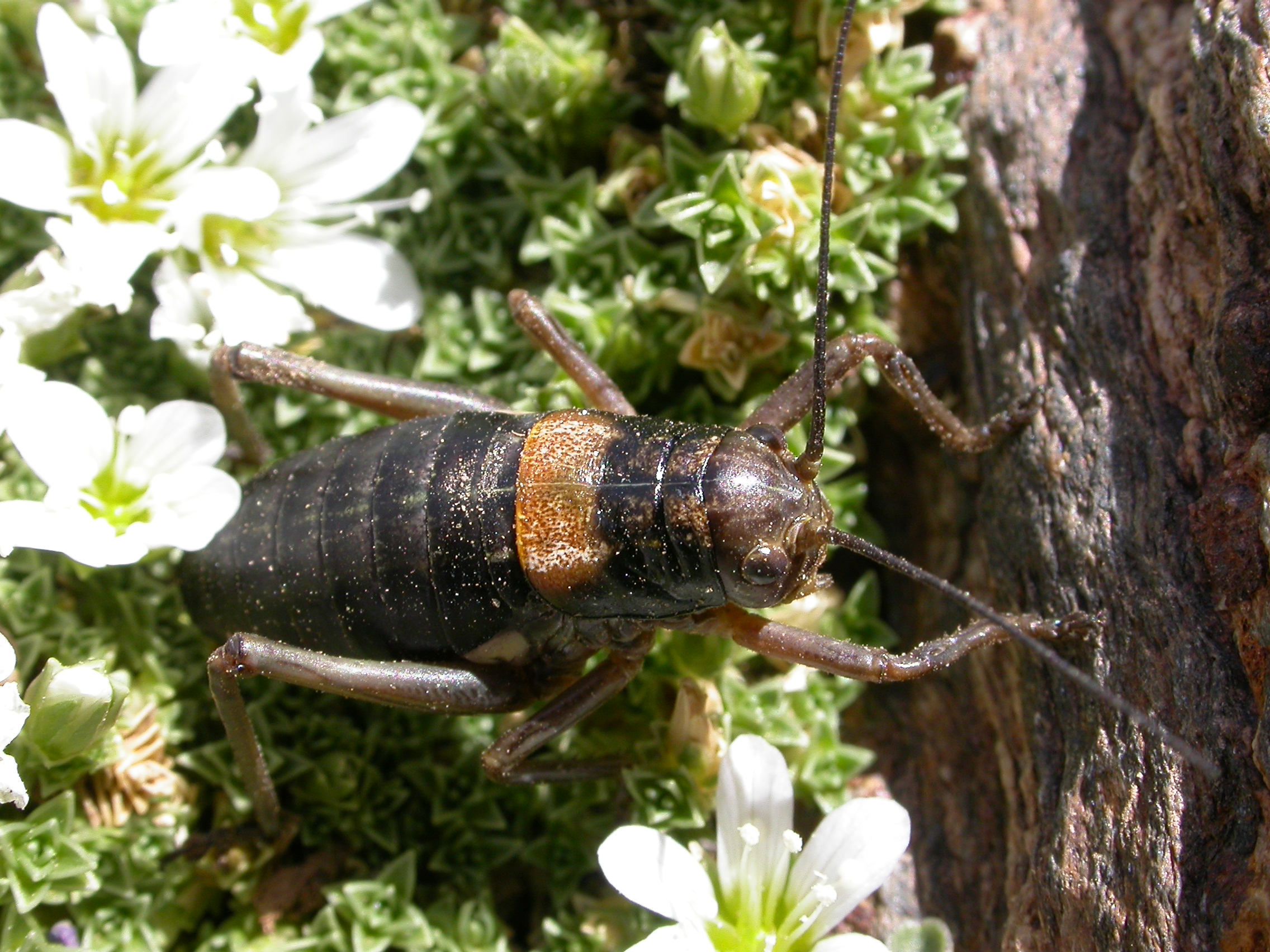 Baetica ustulata, endemismo de Sierra Nevada